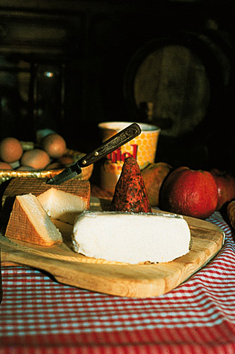 Un beau plateau de fromages du Nord : Le Maroilles et la Boulette d'Avesnes, célébrités fromagères de l'Avesnois (Le fromage de couleur blanche au premier plan n'est pas identifié). Cliché mis à disposition par le Comité du Tourisme du Nord publiable moyennant mention du crédit